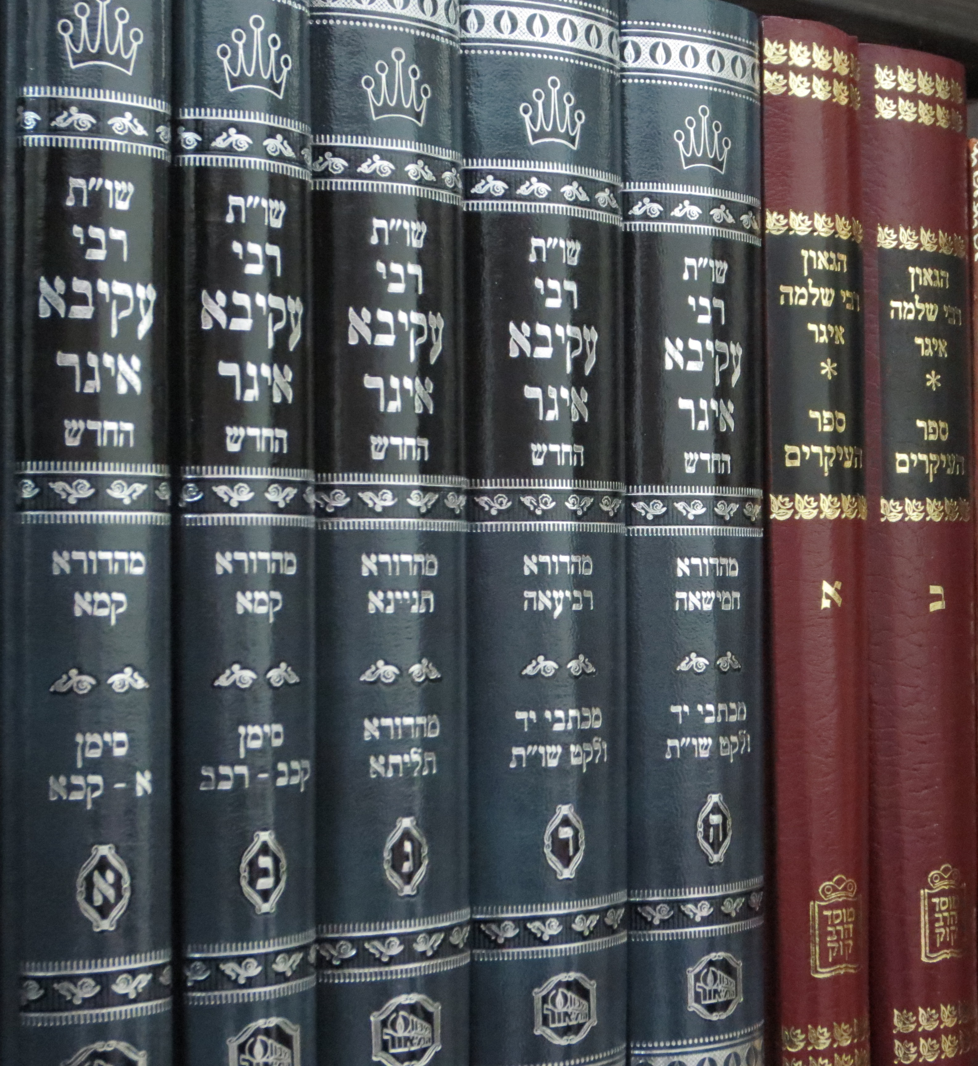 מספרי רבי עקיבא ורבי שלמה איגר